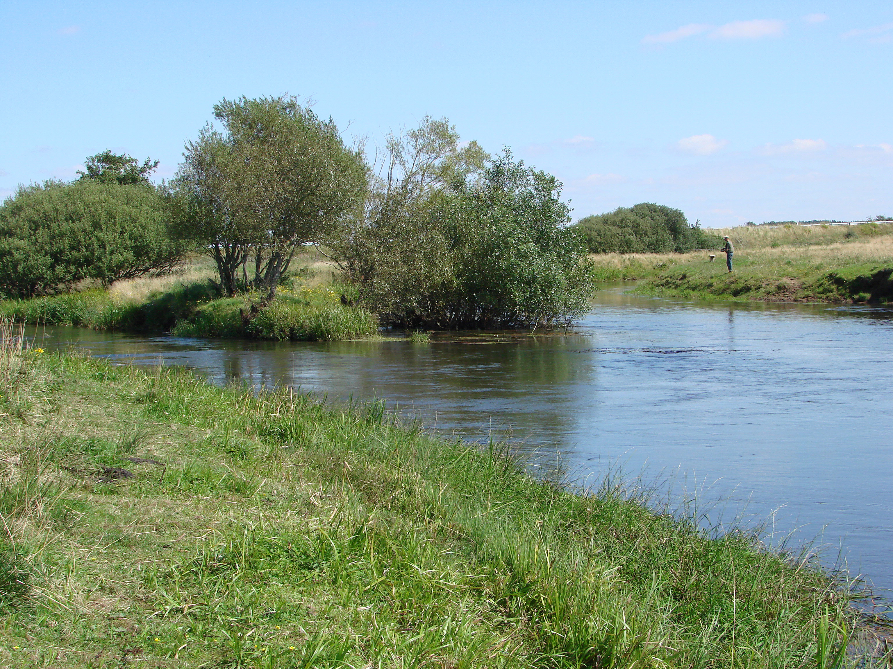 Vorgod Å ved sammenløbet med Skjern Å